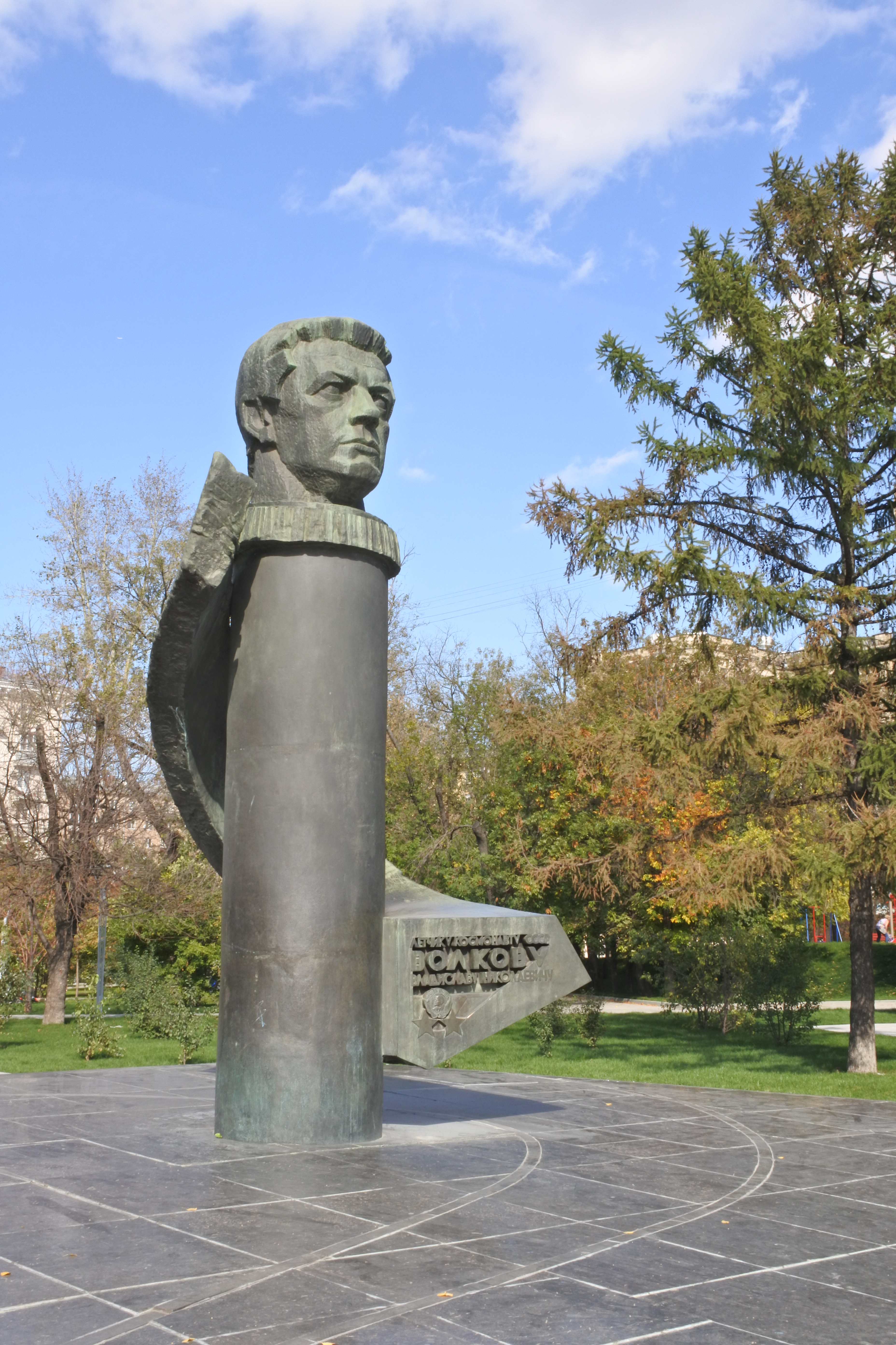 Памятник-бюст В.Н.Волкову: Космонавта Волкова ул., Войковский, Северный округ, Москва